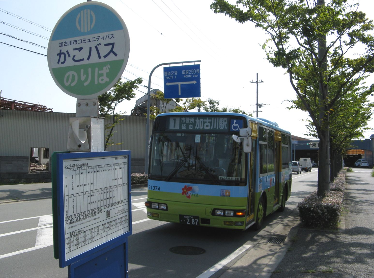 加古川市ゾーンバス（かこバス） 良野東口にて